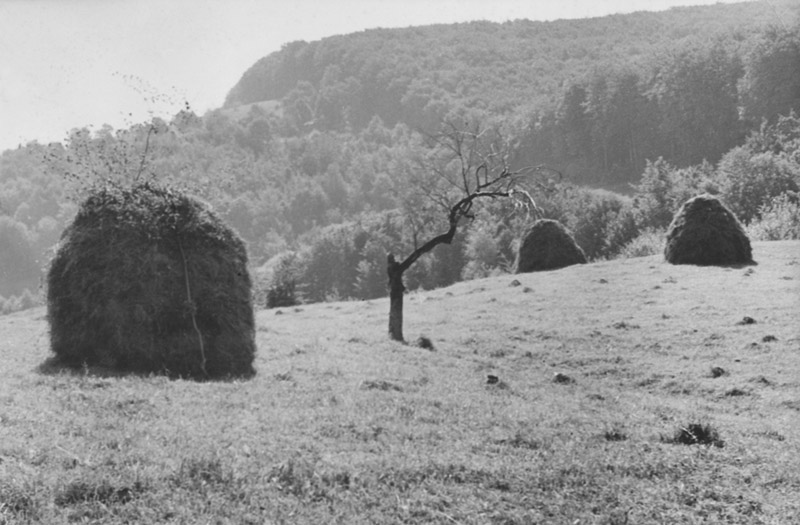 Straseni district. "Scârtă"